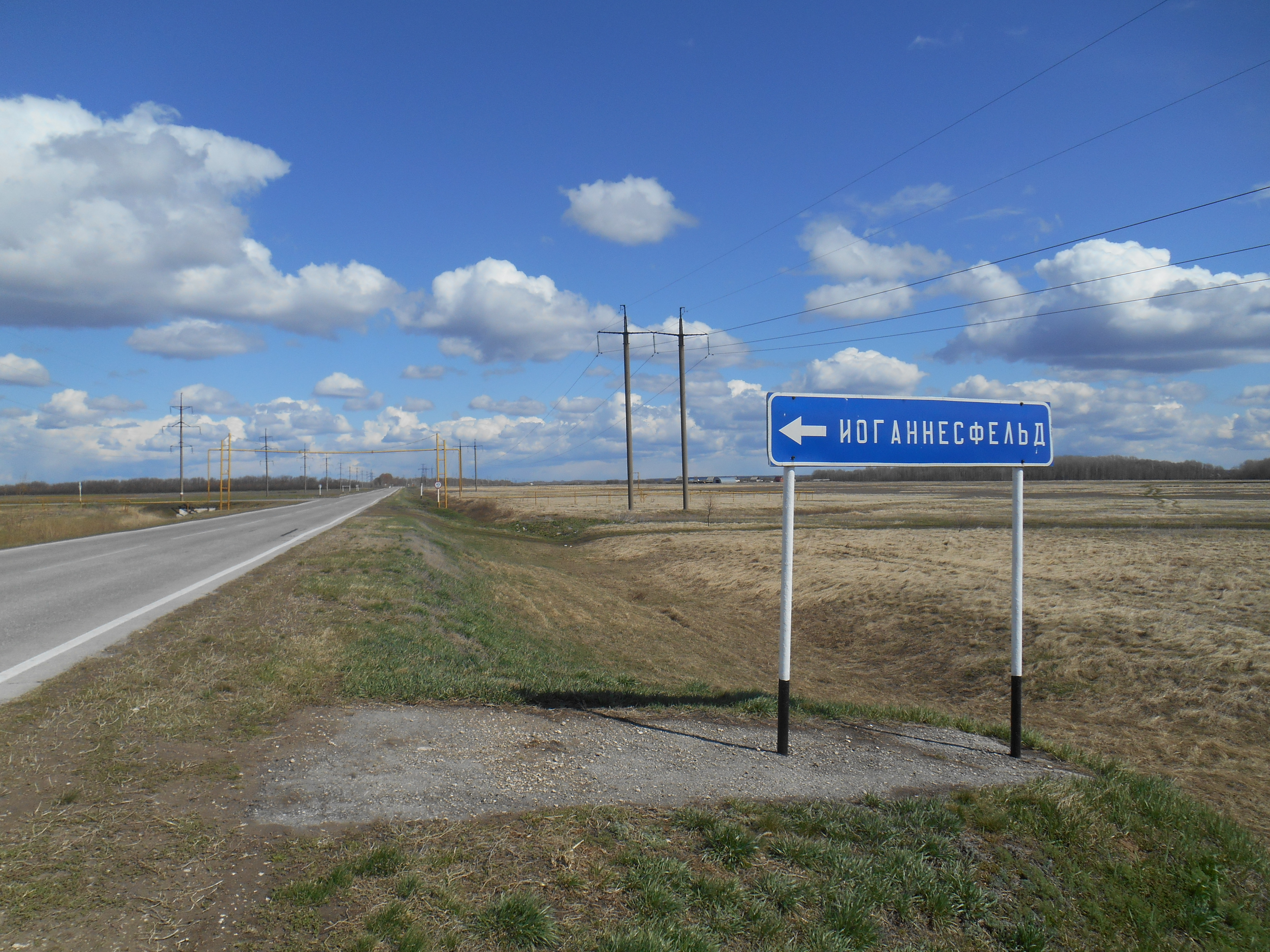 Указатель поворота населенного пункта Иоганнесфельд, Самарская область, Безенчукский район